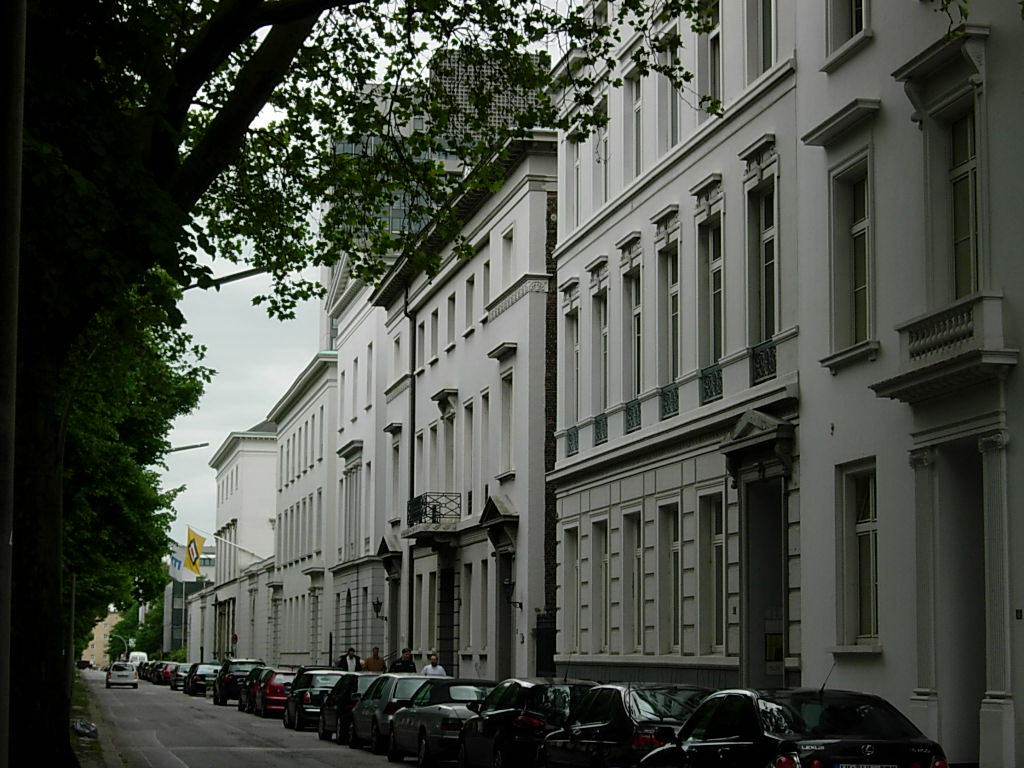 Südseite der Palmaille 45–59 in Altona-Altstadt This is a photograph of an architectural monument. , 14197, 14319 Palmaille 45, 49, 51, Baursches Palais für Georg Friedrich Baur und dessen Kinder, Stadtpalais. Denkmalliste-Altona 2016 S. 757 (PDF; 1,4 MB) Das Palais Nr. 49 beherbergt seit Jahrzehnten die Zentrale der Reederei Deutsche Afrika-Linien/John T. Essberger Ensemble Palmaille 53-65, Baursche Häuser, Reihe von Stadthäusern (bei Nr. 63, 65 lediglich Fassaden) Palmaille 53,55 Stadthaus/Doppelhaus This is a photograph of an architectural monument. 57 This is a photograph of an architectural monument. Ensemble 30297 Palmaille 45, 49, 51, 53, 55, 57, 59, 61